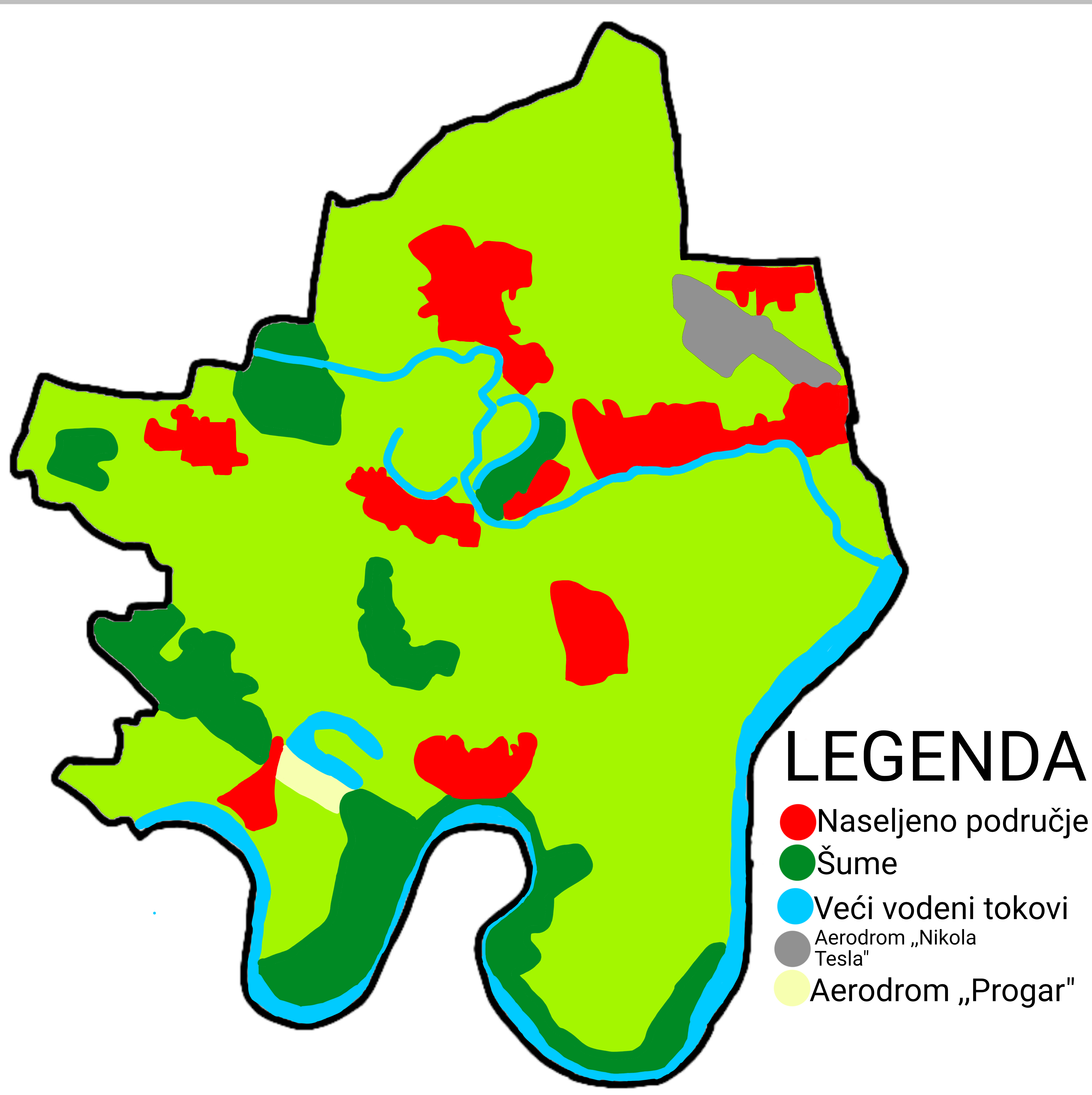 Srpski (latinica): Mapa Gradske Opštine Surčin